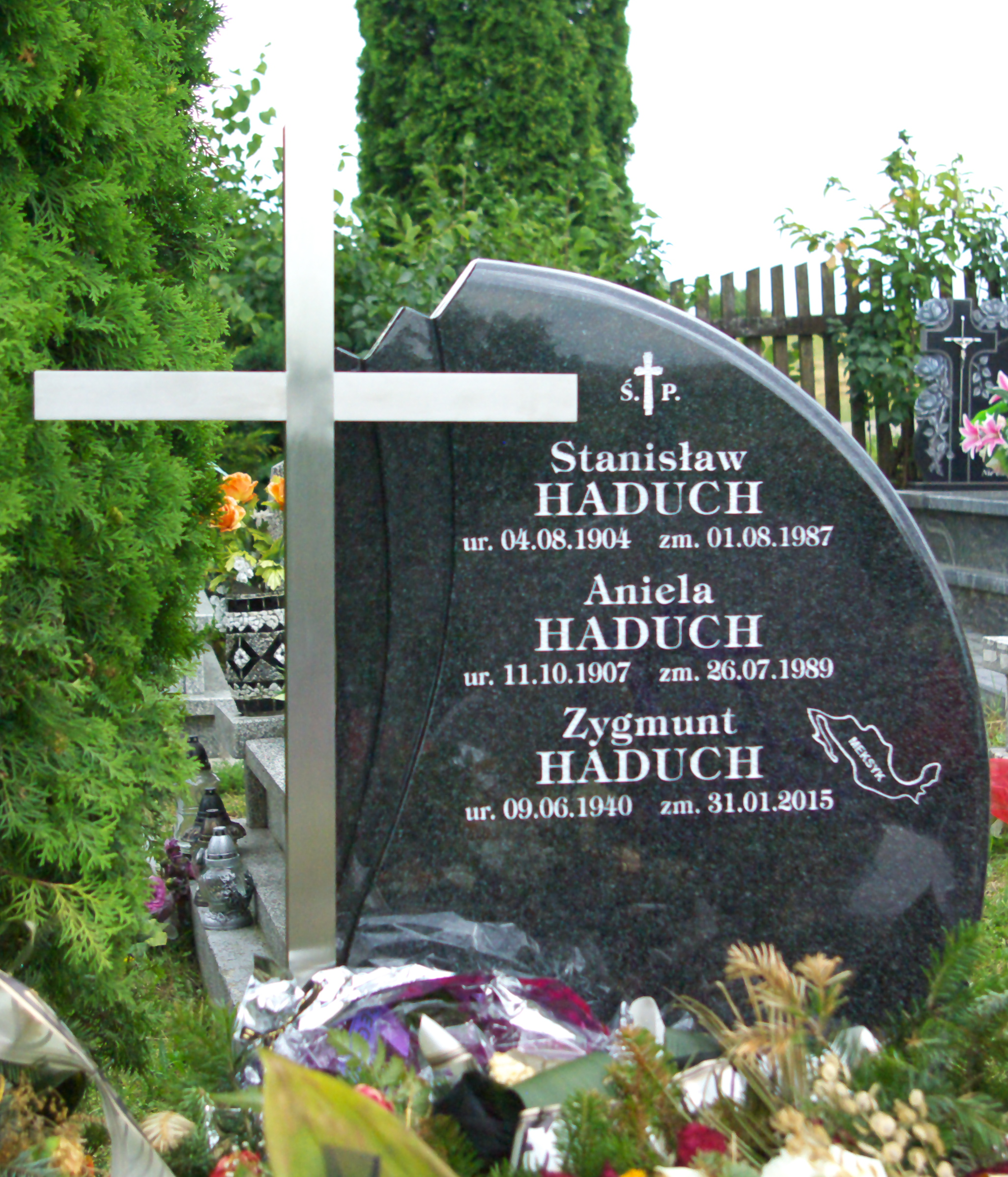 Grobowiec rodziny Haduch na cmentarzu w Płowcach (pochowany prof. Zygmunt Haduch-Suski)